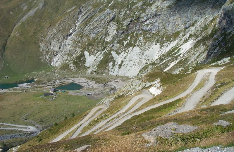 Rifugio Scarfioto - August 2000 - (c) Jan Liska - Benutzer:BlueGerbil